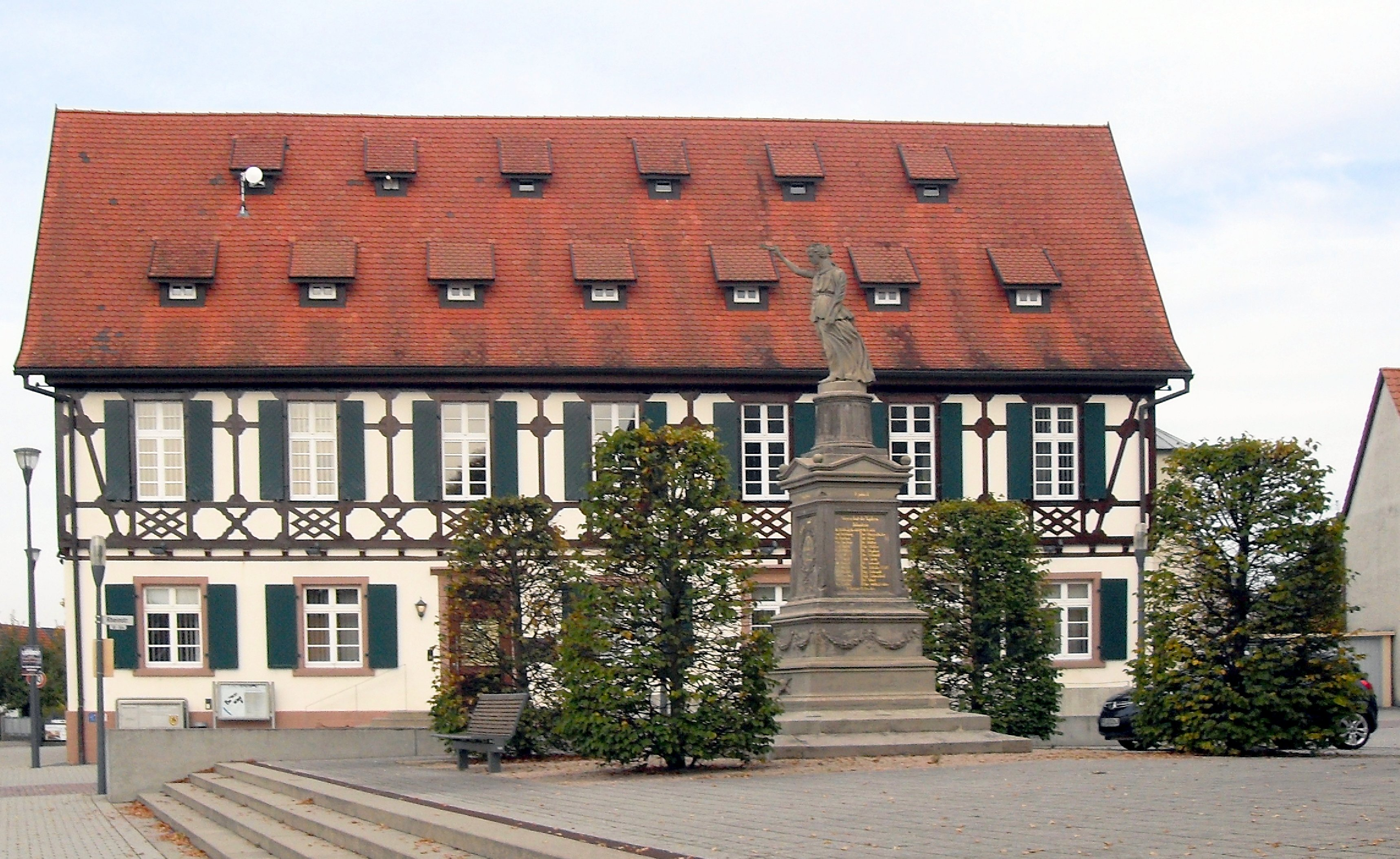 Rathaus der Stadt Rheinau im Stadtteil Freistett, Ortenaukreis